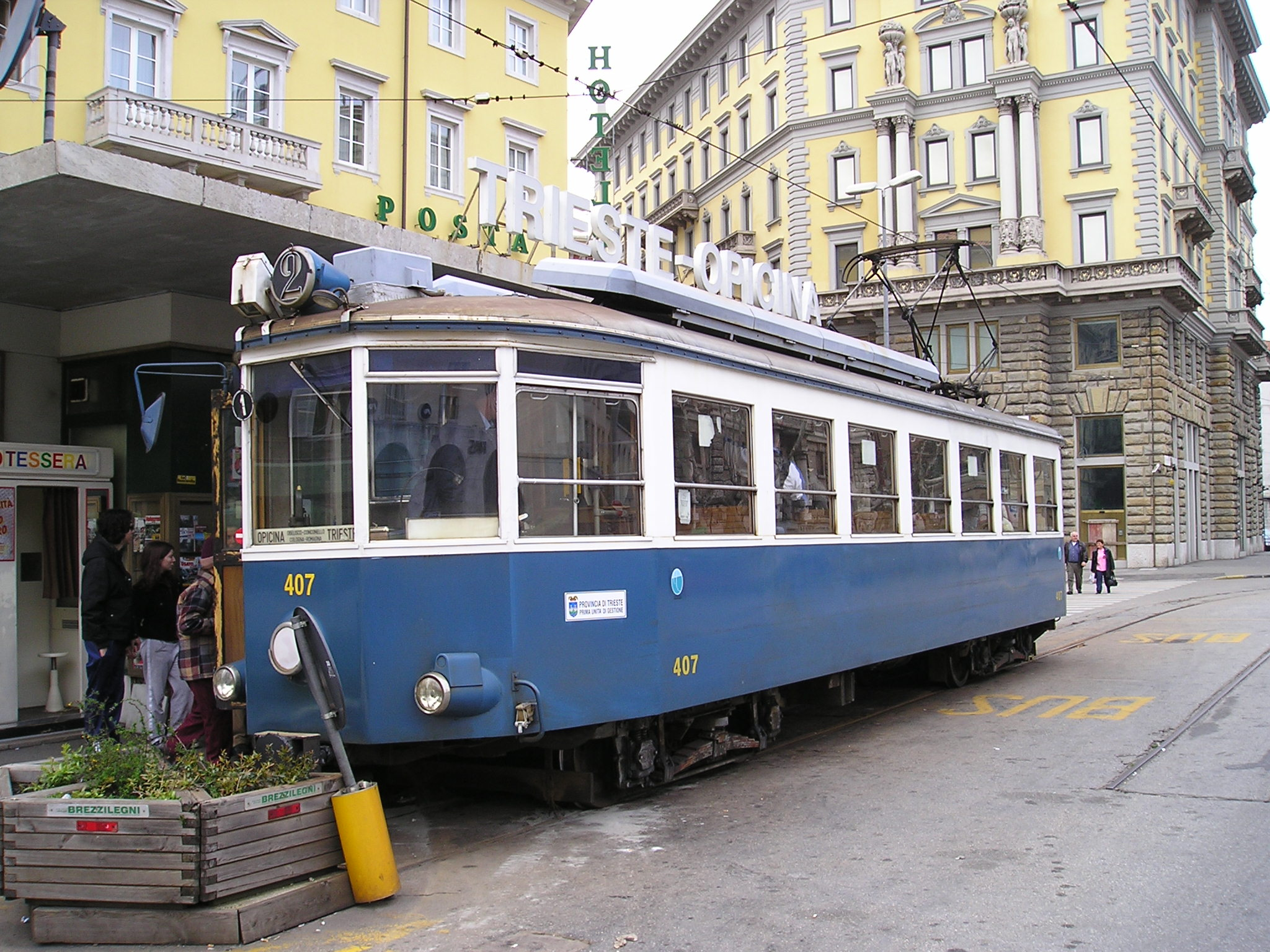 Motrice tramviaria n° 407 in piazza Oberdan a Trieste il 23 aprile 2005